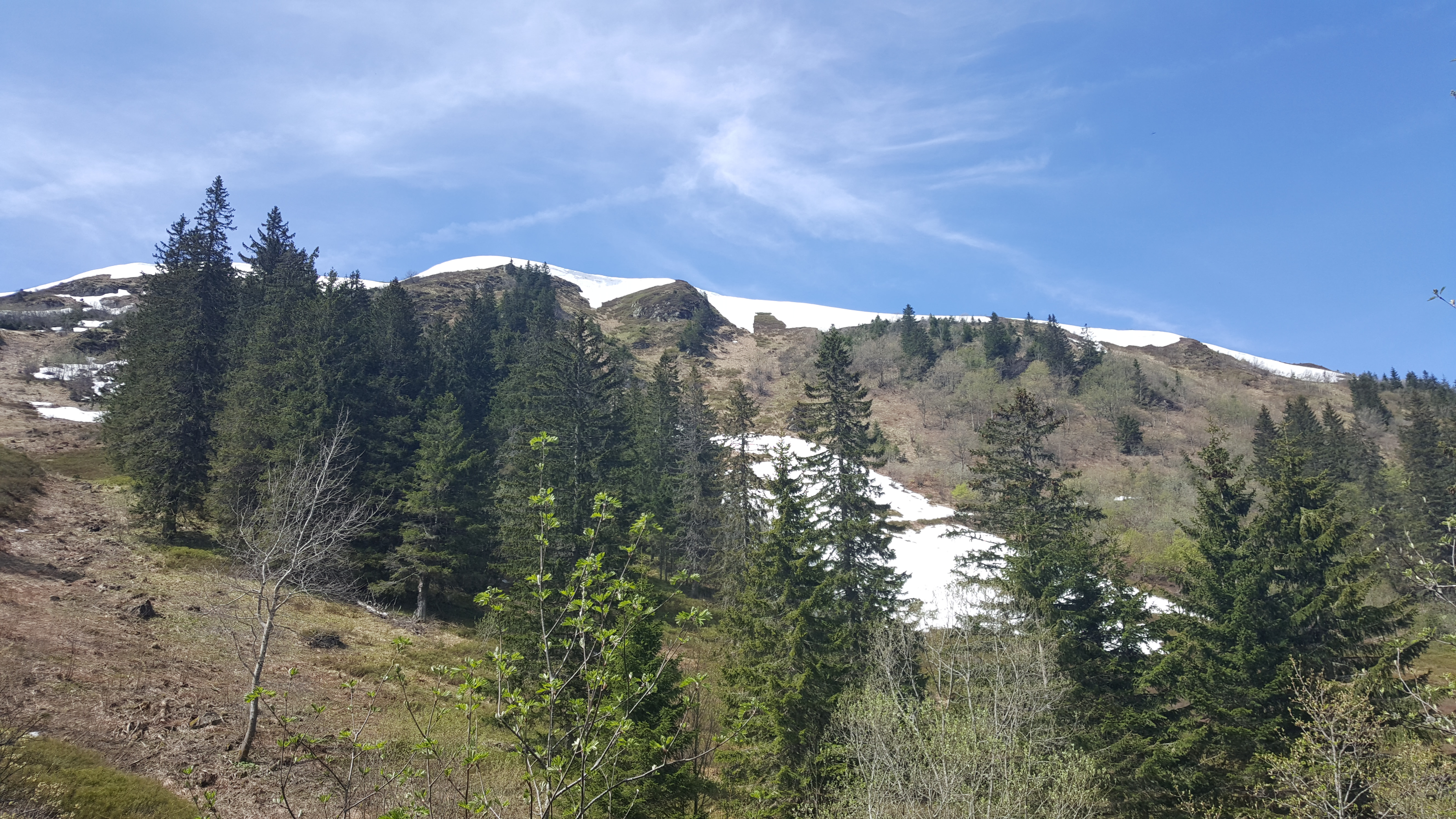 Feldberg-Osthang (Osterrain) im Mai, Blick aus dem Kar Zastler Loch